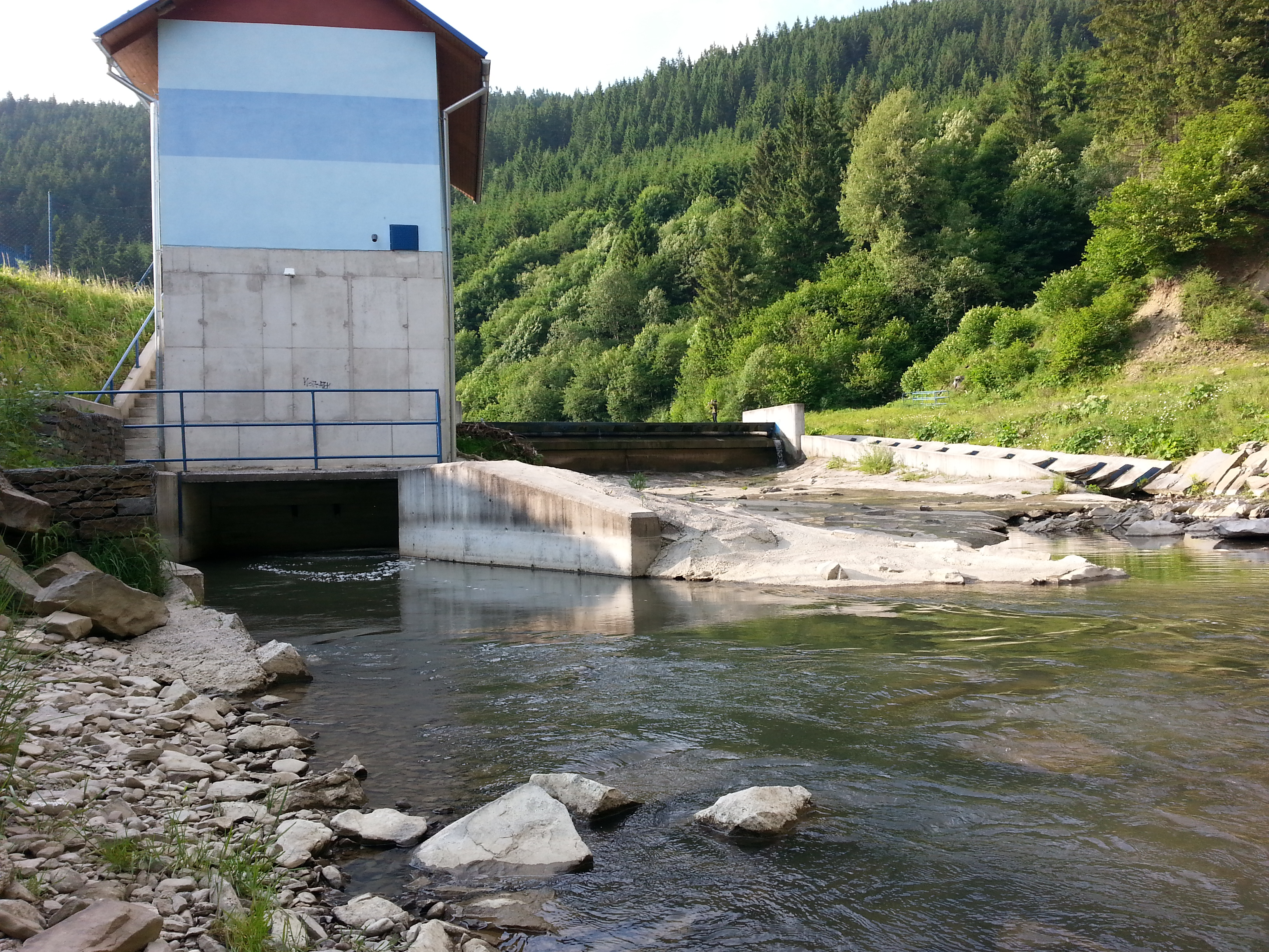 Small hydro plant Lomná